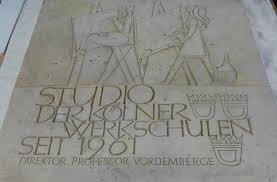 Plakette in der Wand neben dem Eingang zum Albergo in Vinci (Toscana ), dem Geburtsort von Leonardo da Vinci